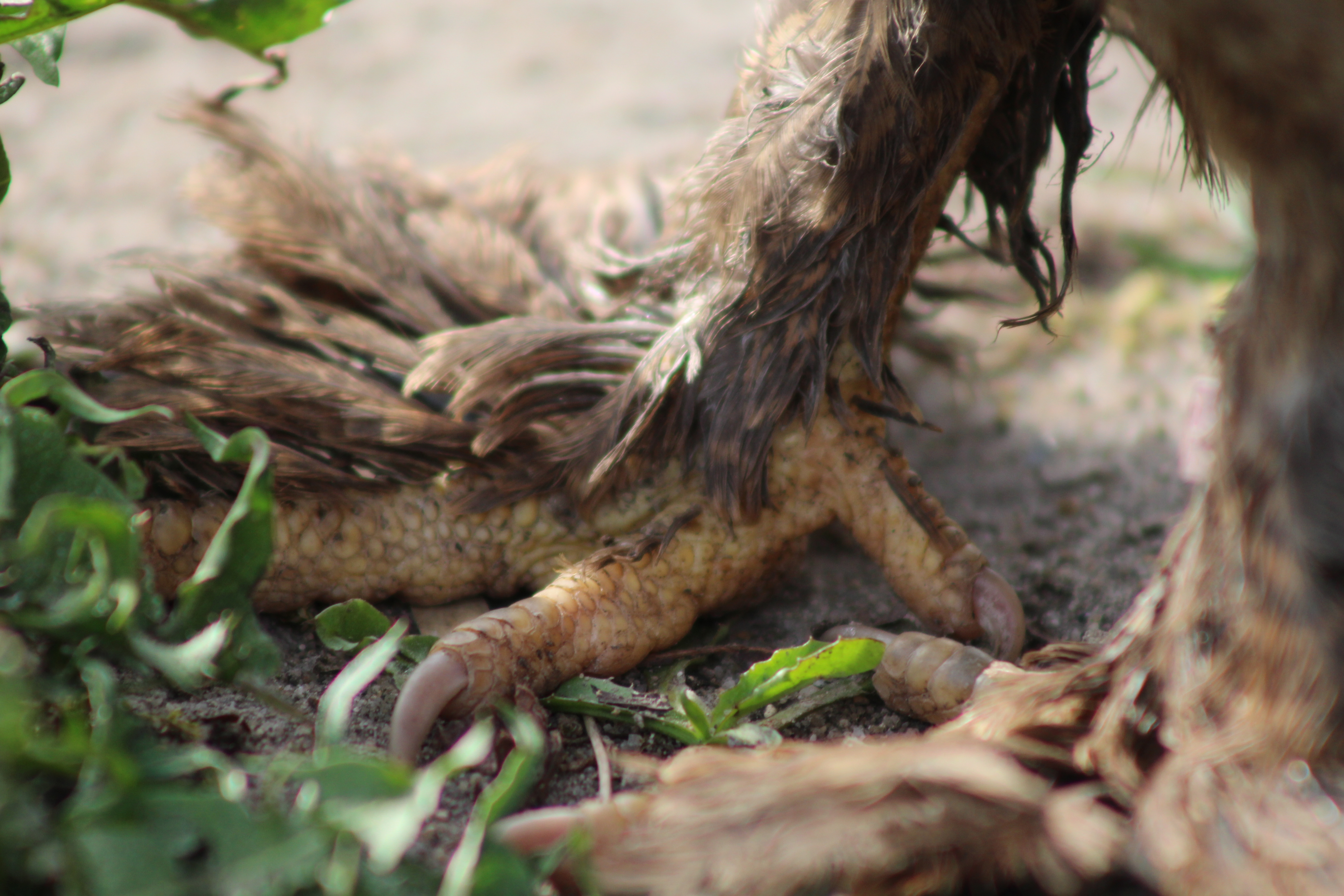 Befiederte Zehen eines Zwerg-Brahma Huhns